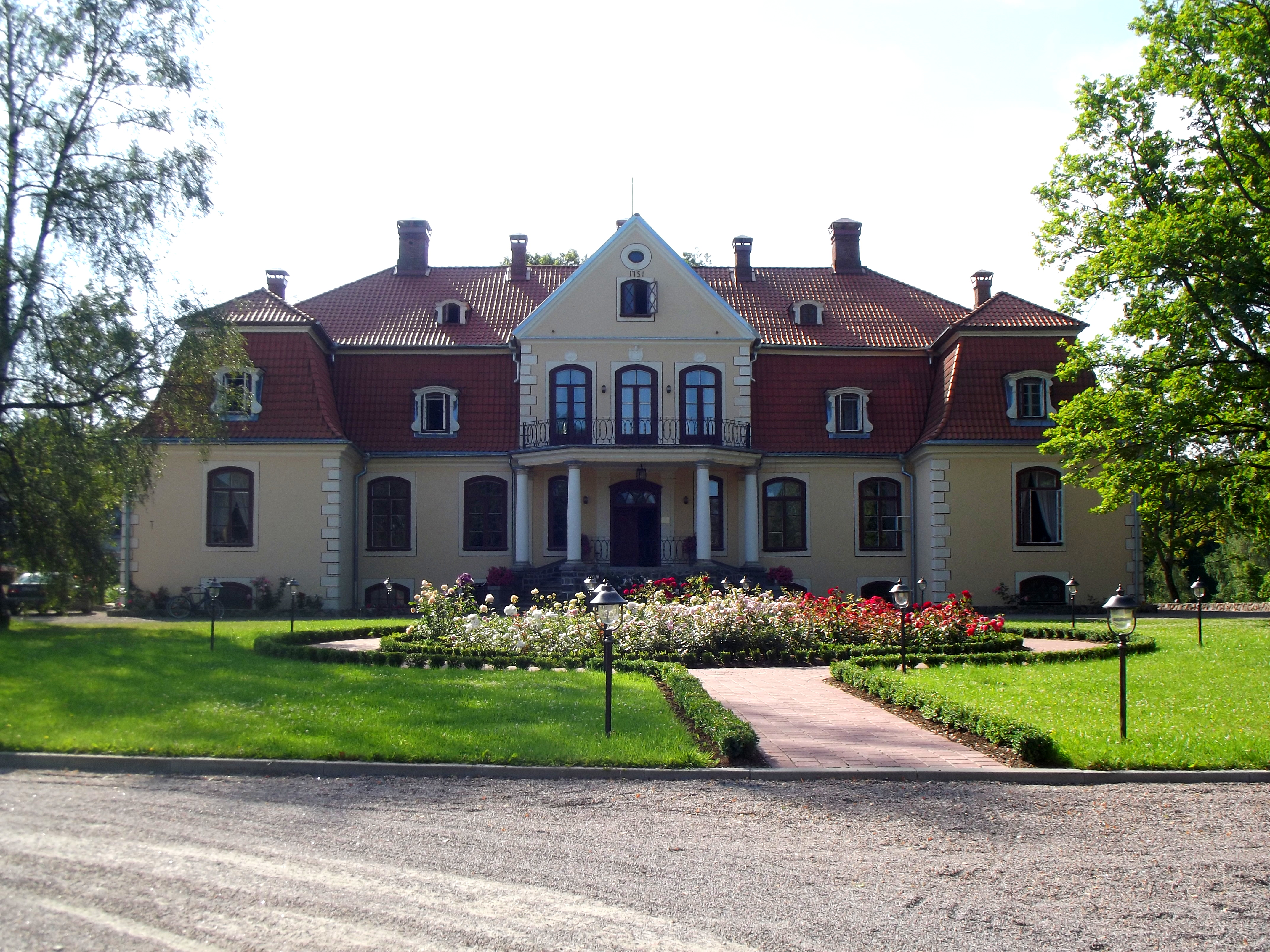 Liepupes muiža